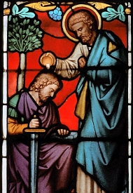 Kirchenfenster in St. Johannis-Harvestehude in Hamburg (Deutschland), Taufdarstellung im südlichen Mittelschiff